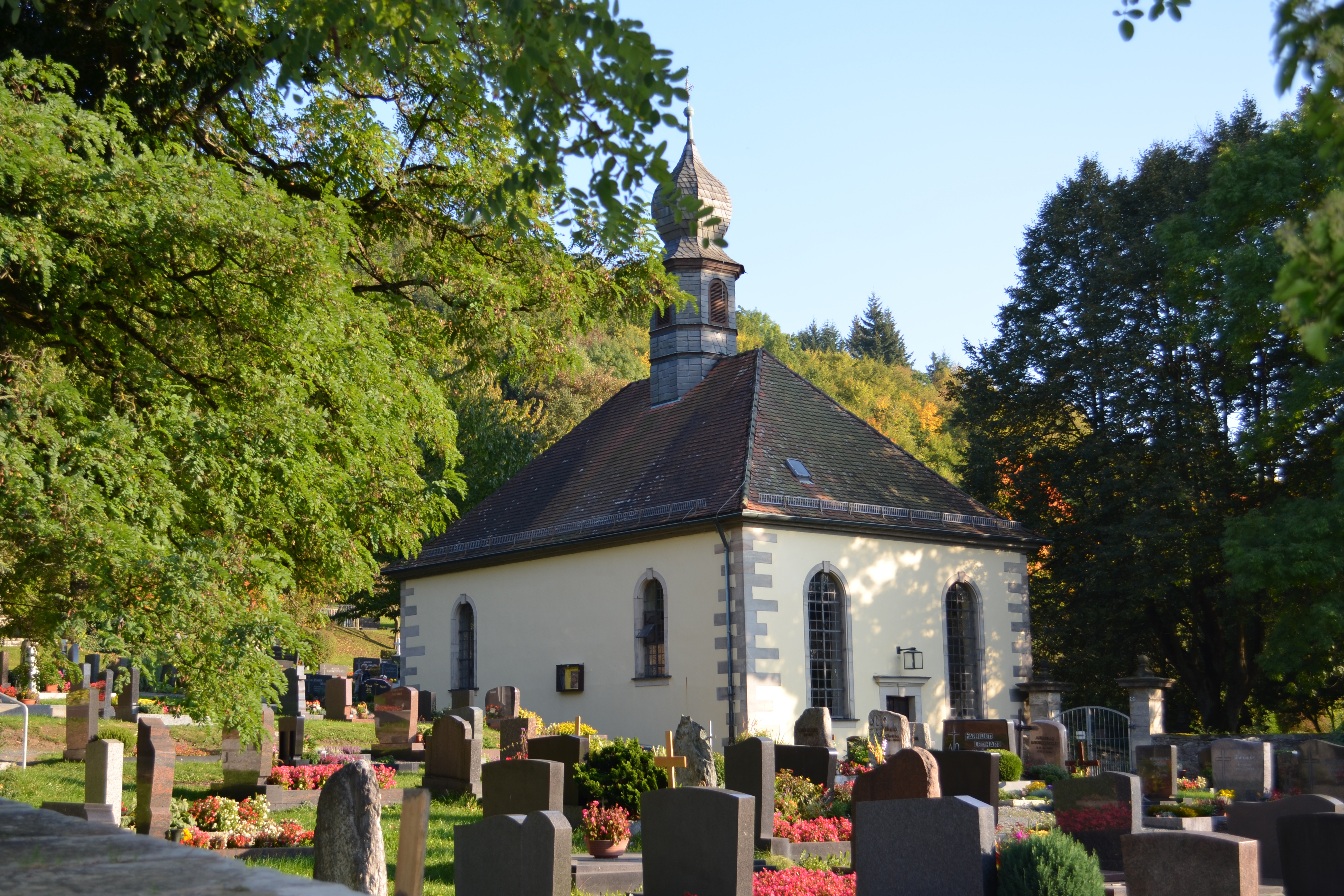 Die 1765 errichtete Friedhofskirche in Goldkronach